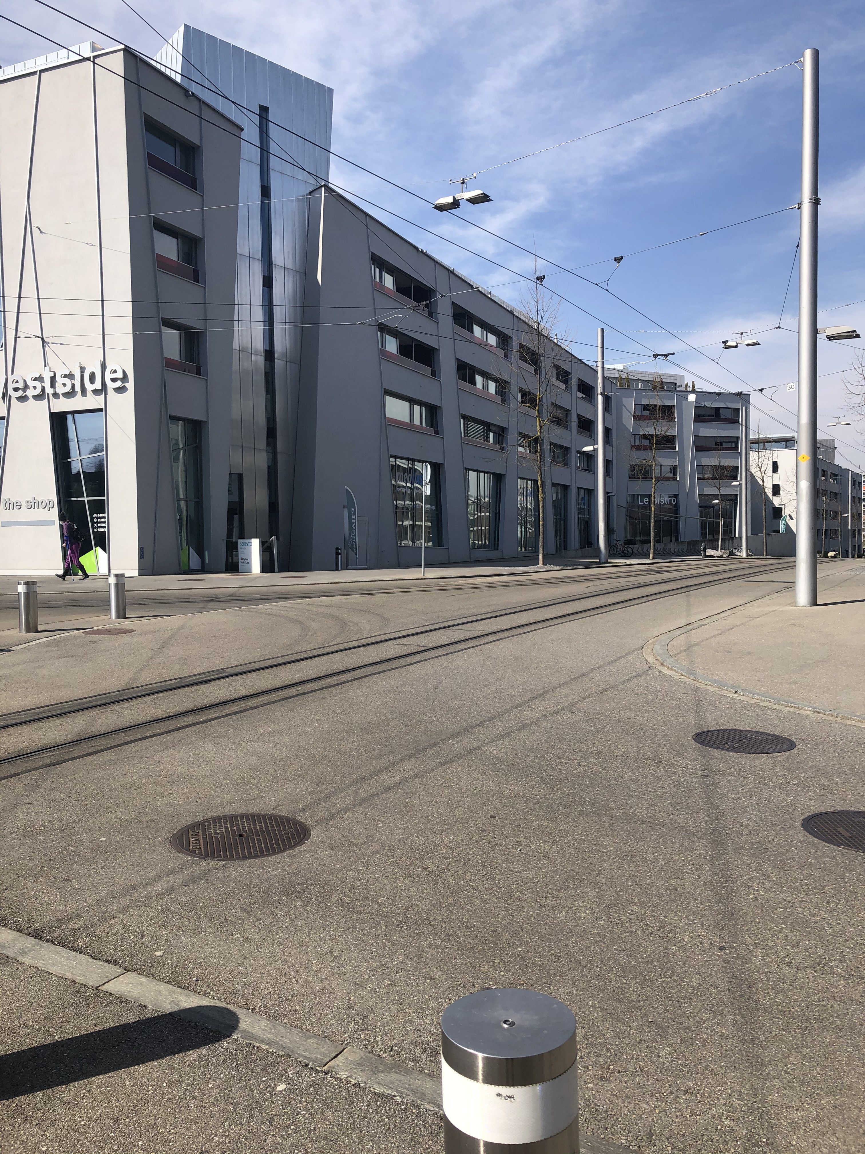 Westside Bern Seniorenresidenz Senevita Westside